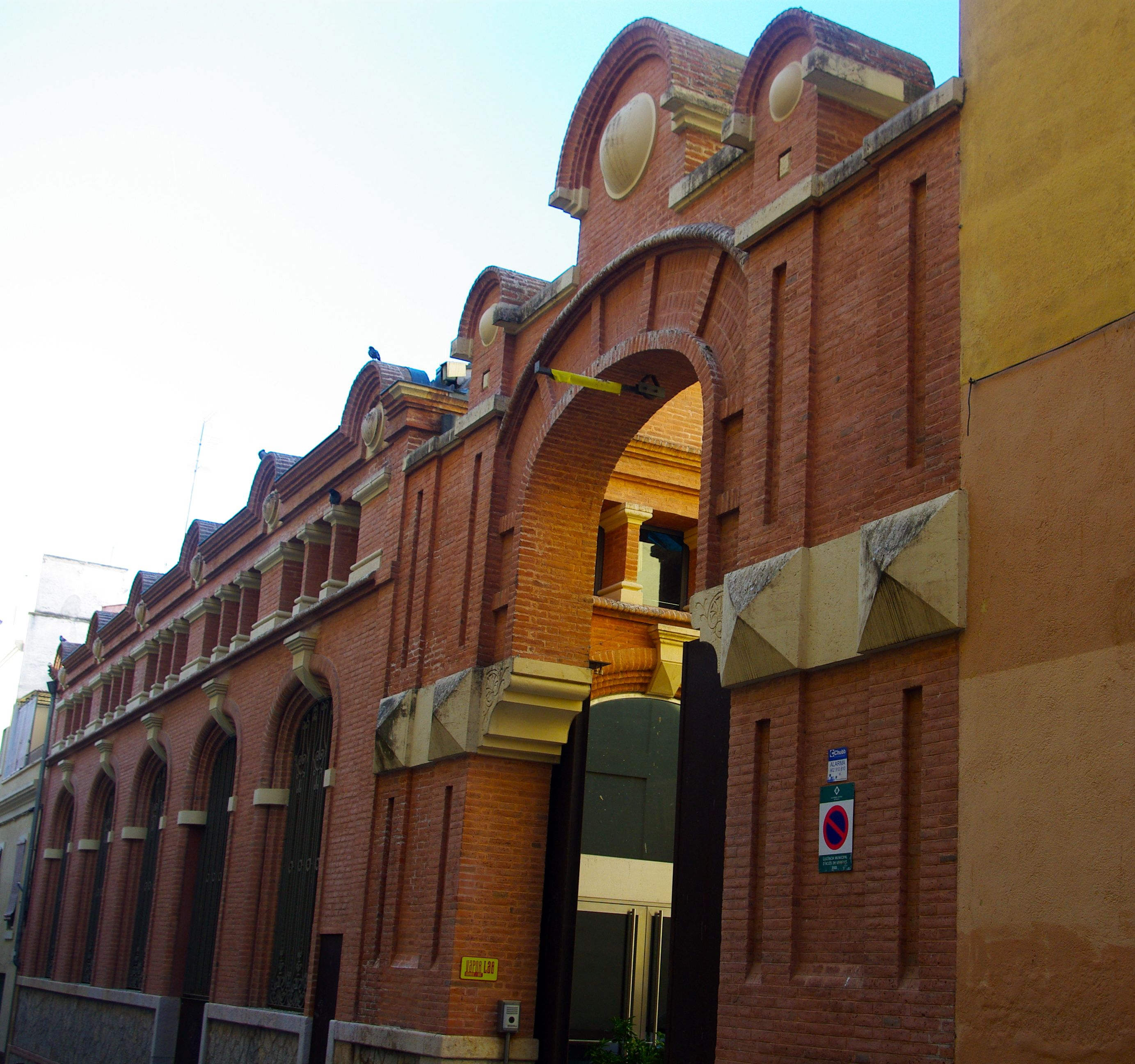 Vapor Vell al carrer de sant Serapi